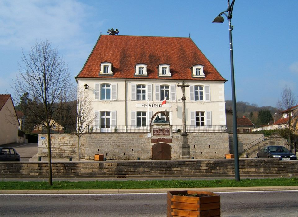 Mairie de Vaivre-et-Montoille